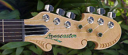 Langcaster First Model Head